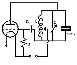 Montajul piezoelectric în rezonanță este folosit mereu cânt sunt necesare energii ultrasonore mari. După cum se observă în figura 2, cuarțul piezoelectric este montat în paralel cu condensatorul circuitului oscilant LC. El vibrează forțat pe frecvența curentului electric alternativ care i se aplică în paralel cu circuitul oscilant.